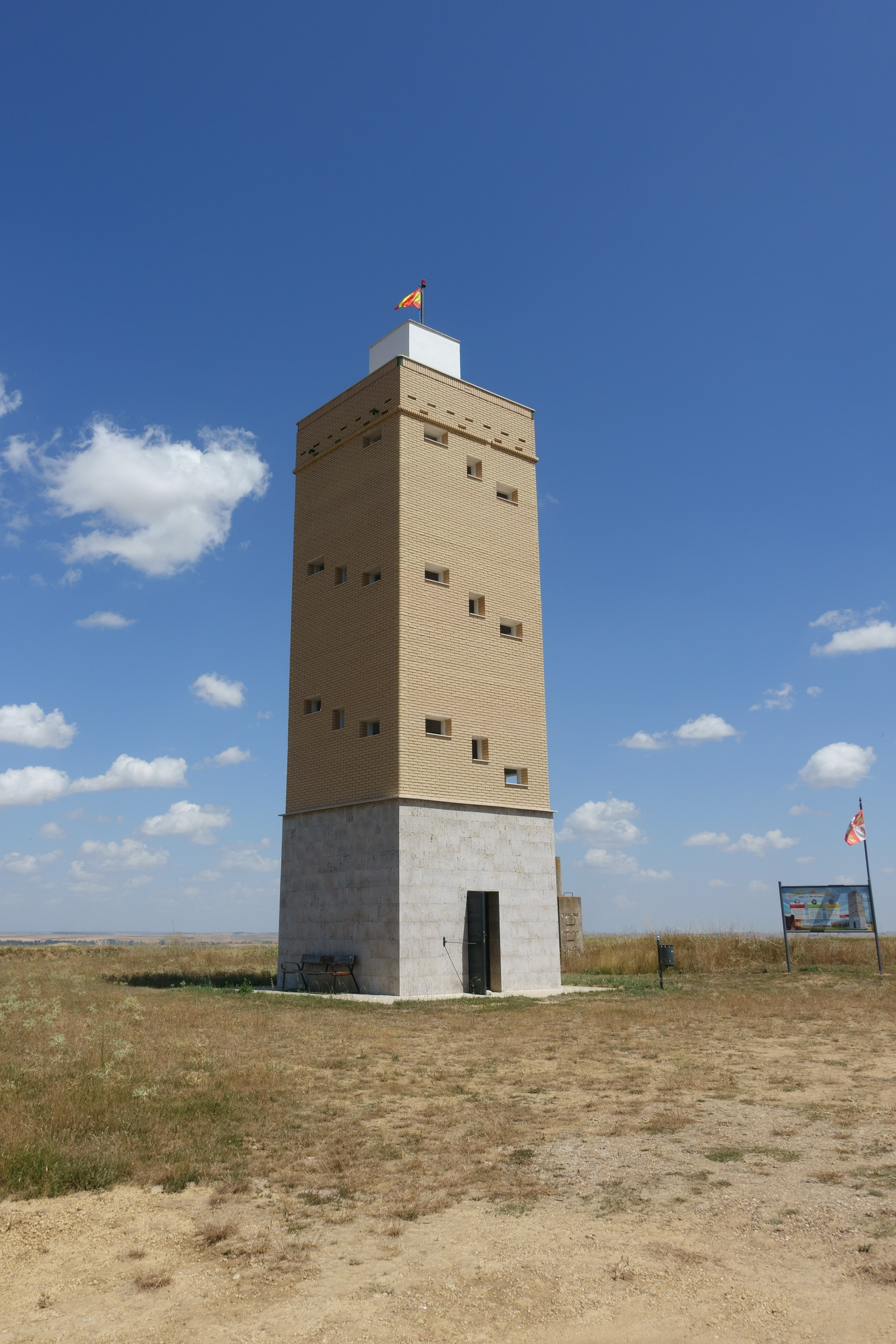 Torre-mirador de Lomas (Palencia, España).